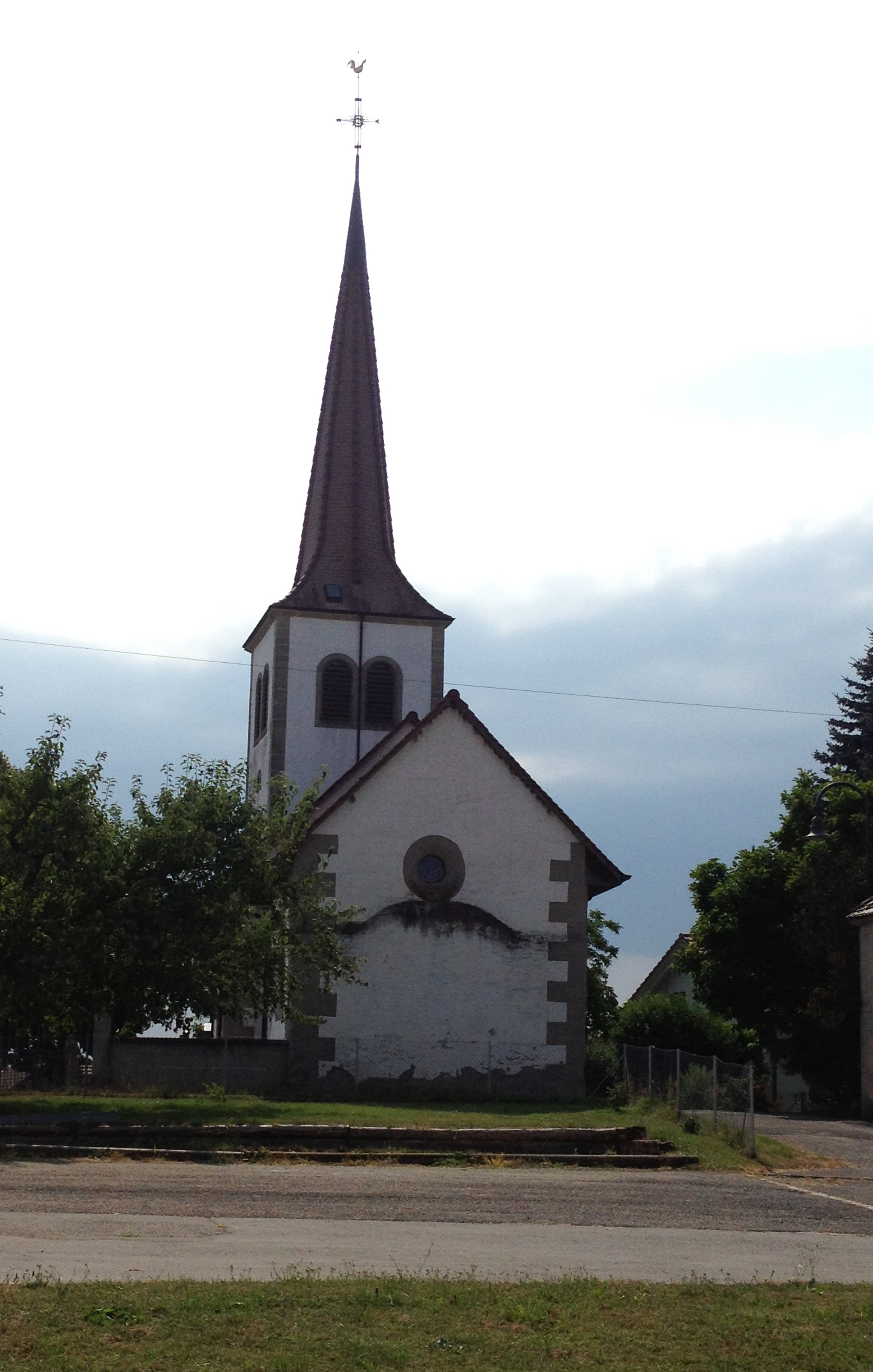 L'ancienne église de Montbrelloz dans la commune fribourgeoise de Vernay en Suisse.